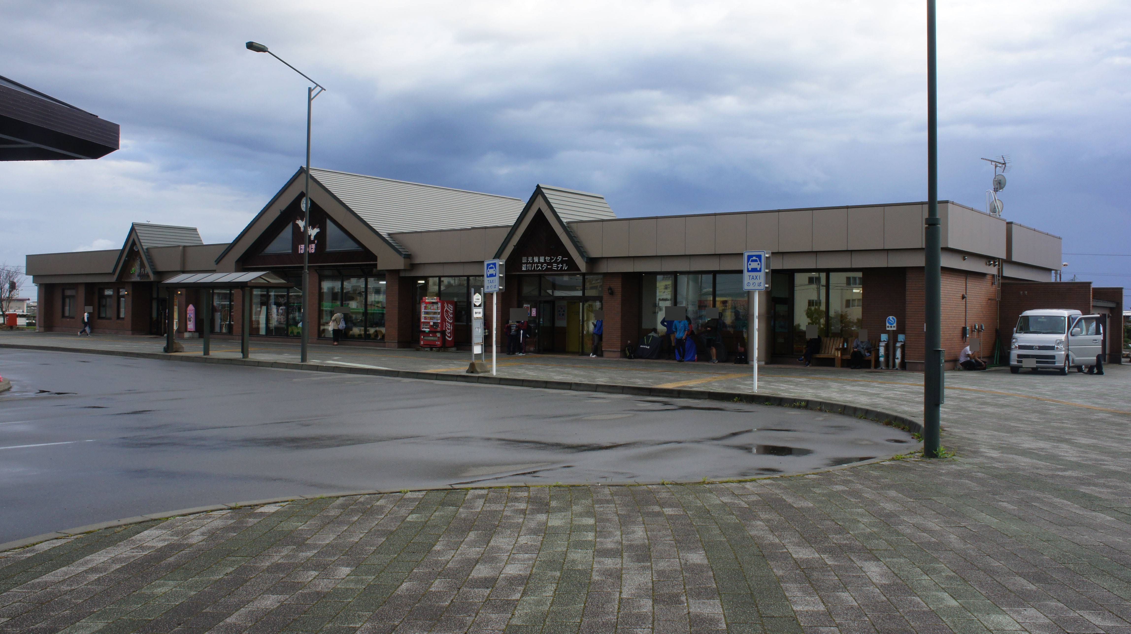 JR日高本線・静内駅の駅舎